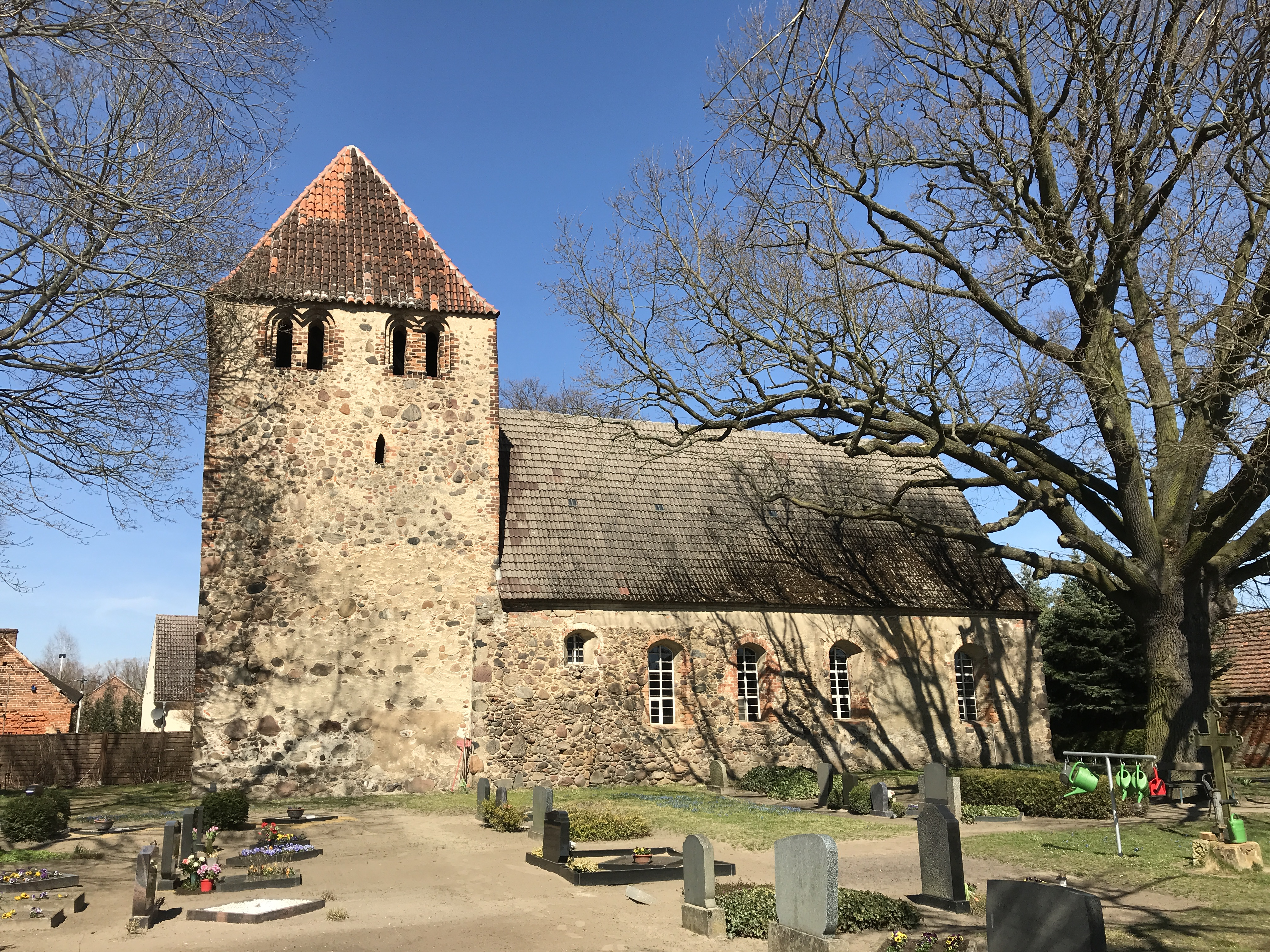 Die Dorfkirche Willmersdorf-Stöbritz in der Stadt Luckau entstand im frühen 15. Jahrhundert. Sie steht im Landkreis Dahme-Spreewald in Brandenburg.